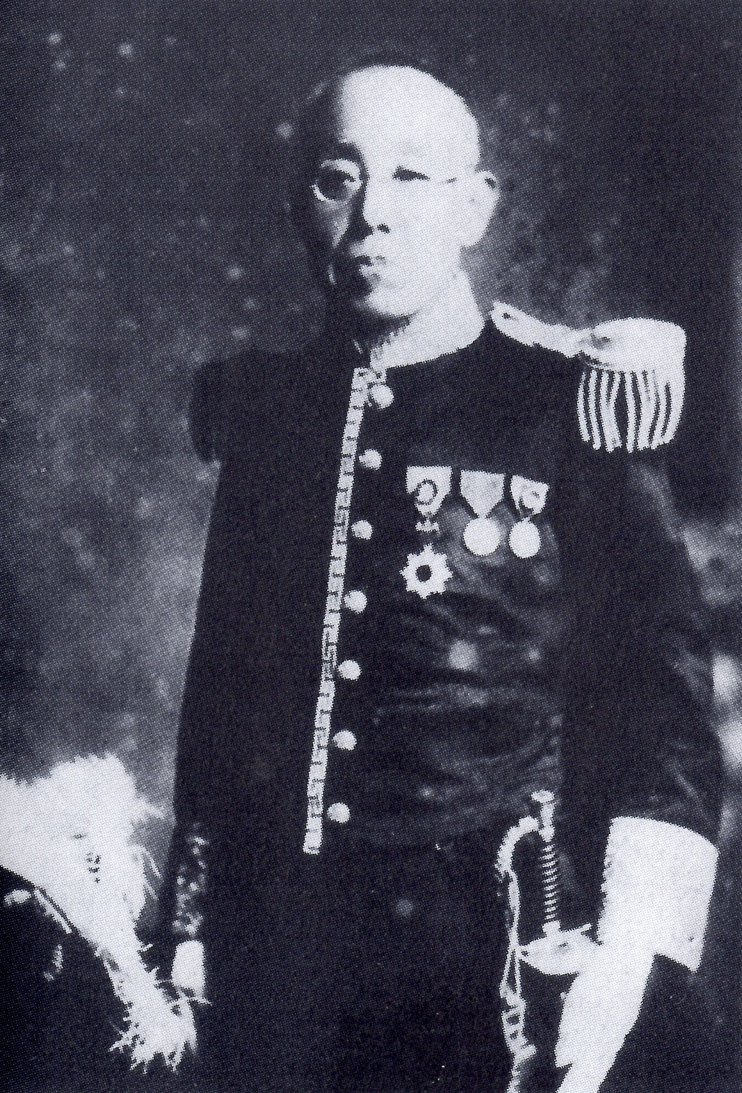 戸田忠友の肖像写真。